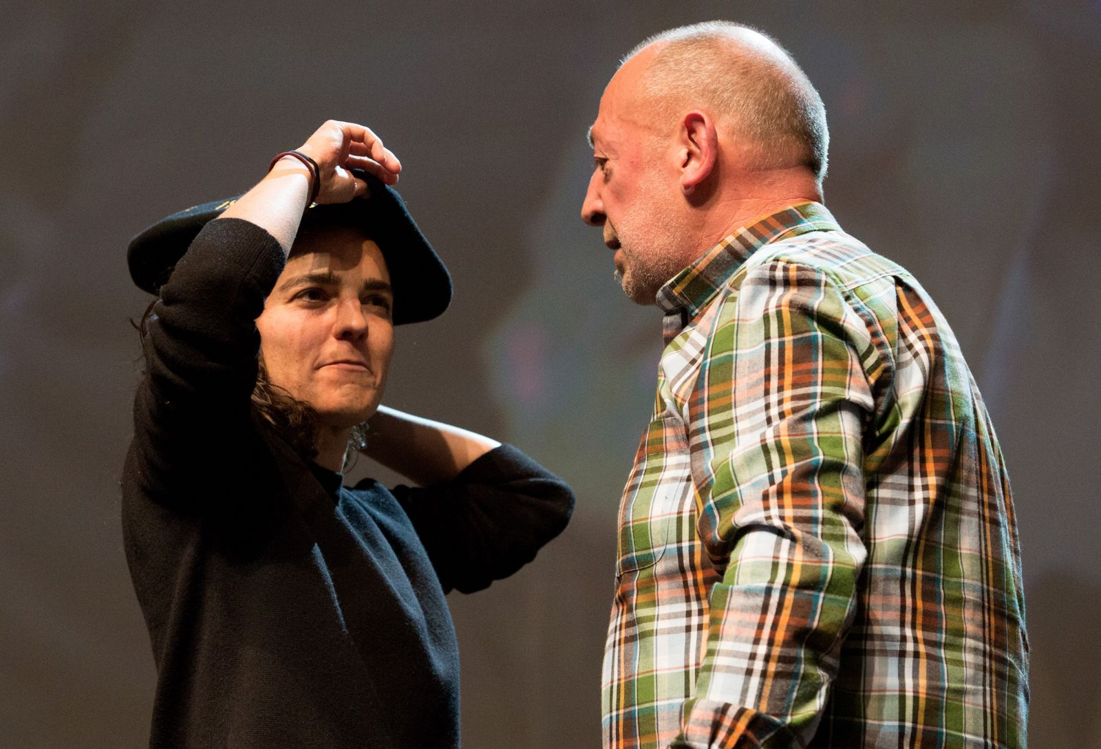 2017ko Bertsolari Txapelketa Nagusiko finalean Argiako Dani Blancok egindako argazkia.